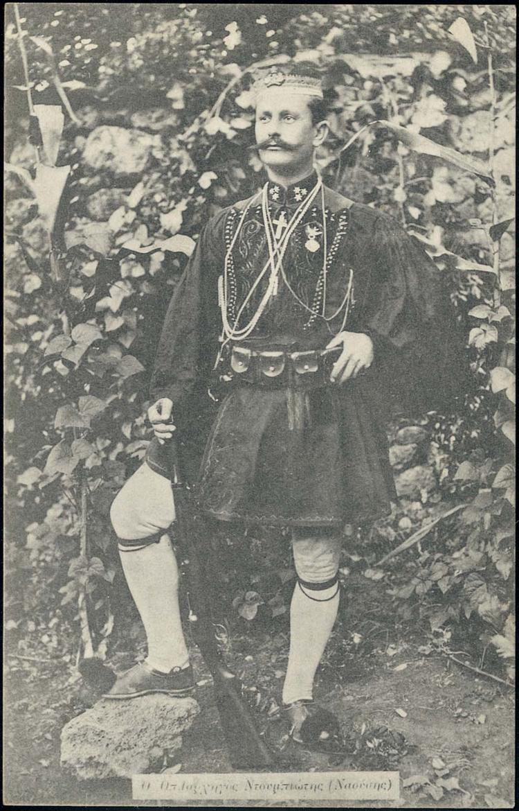 Гръцкият андартски капитан Николаос Дубиотис.